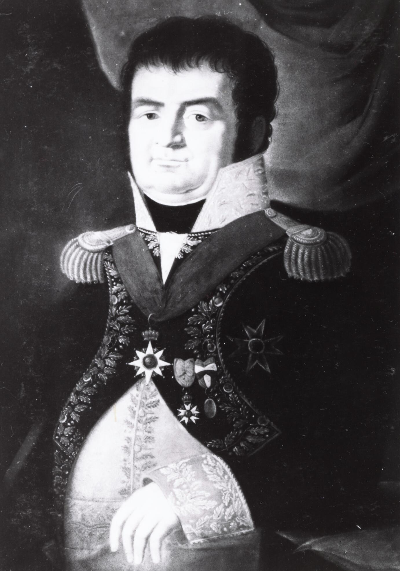 Portret van Albert Kikkert (1762-1819). Pastel. Afmetingen onbekend. Ede, J.Josselin de Jonge (privéverzameling).